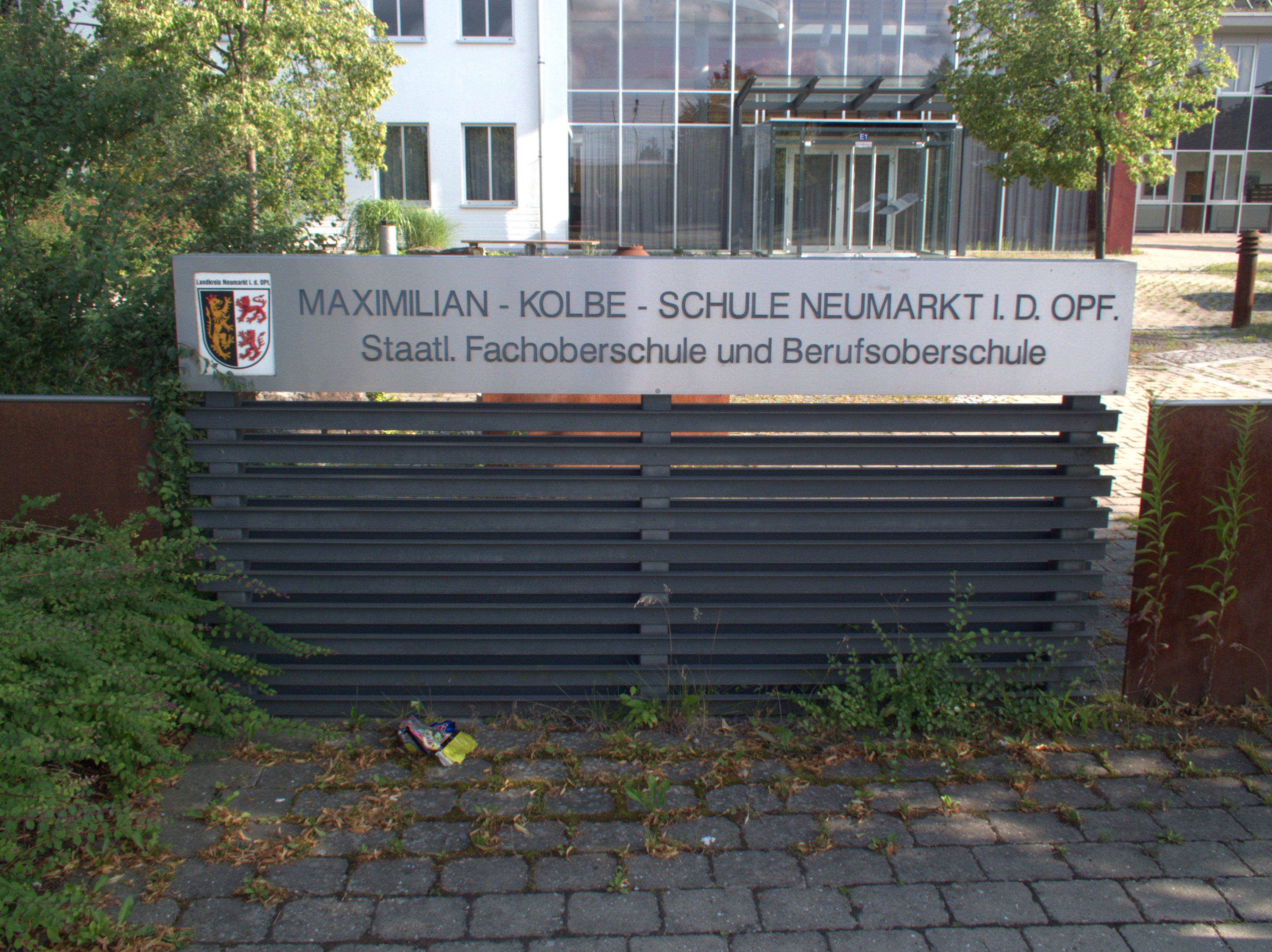 Maximilian Kolbe Schule in der Kerschensteiner Straße 7, Neumarkt